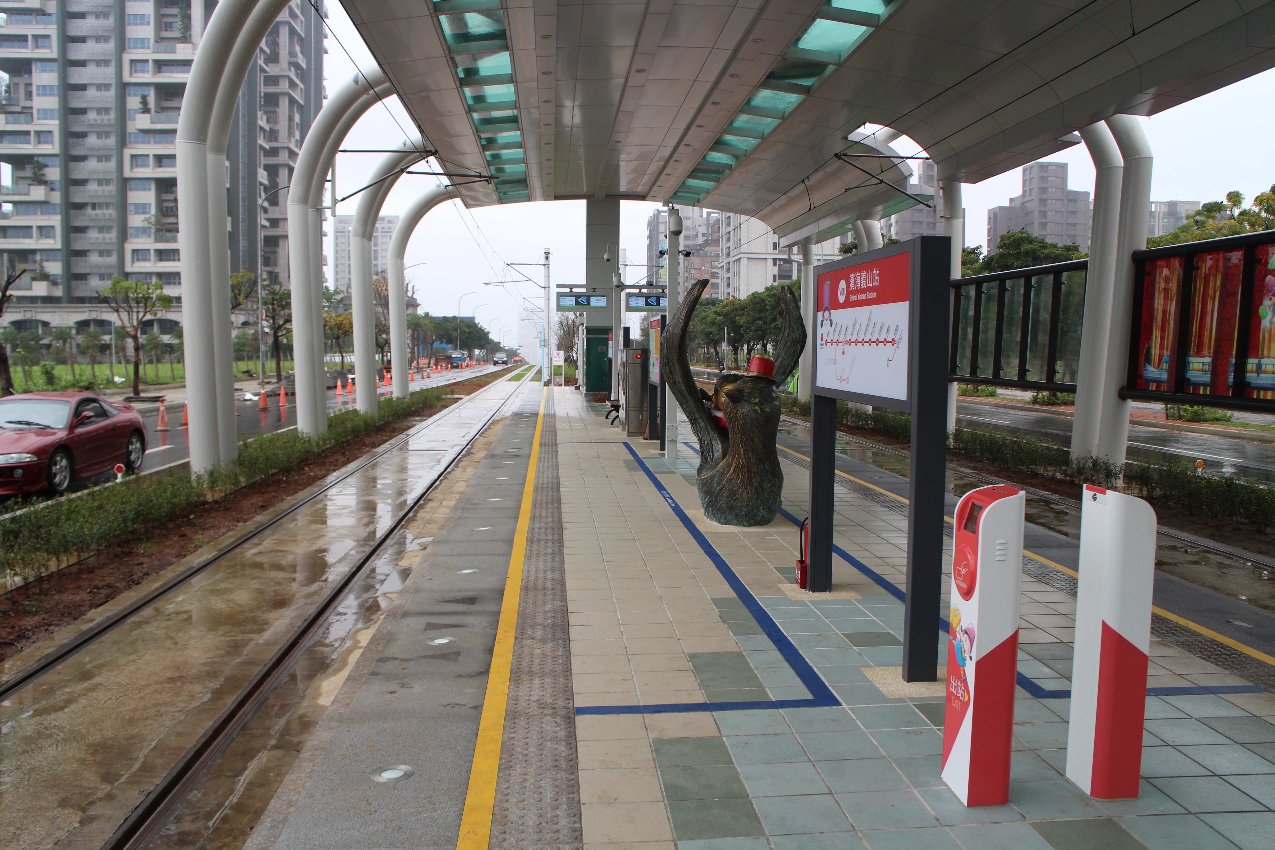 淡海輕軌濱海義山站